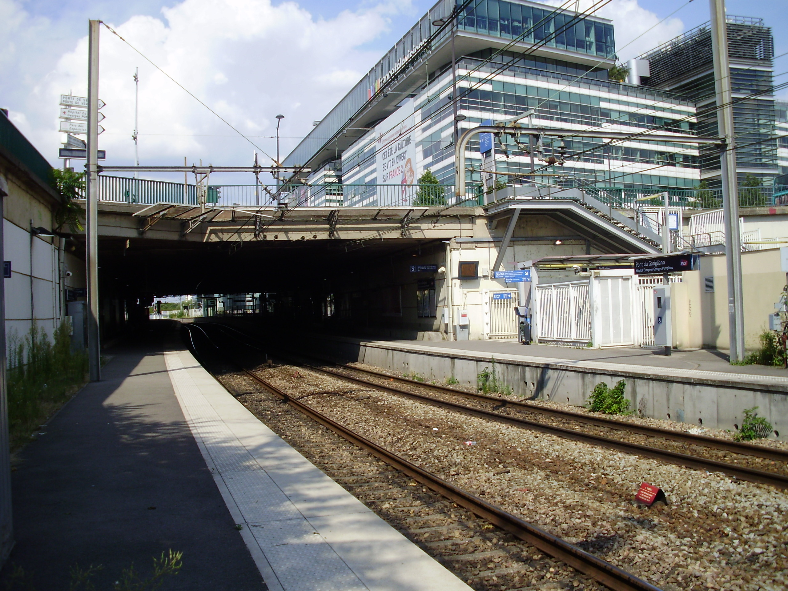 Gare du Pont du Garigliano, à Paris 15e, France : vue depuis le quai en direction du centre de Paris et au-delà, notammment vers Dourdan et Étampes.